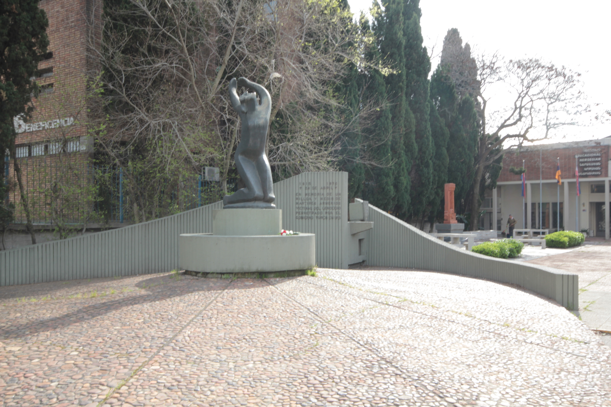 Martires armenios ubicado en Montevideo.